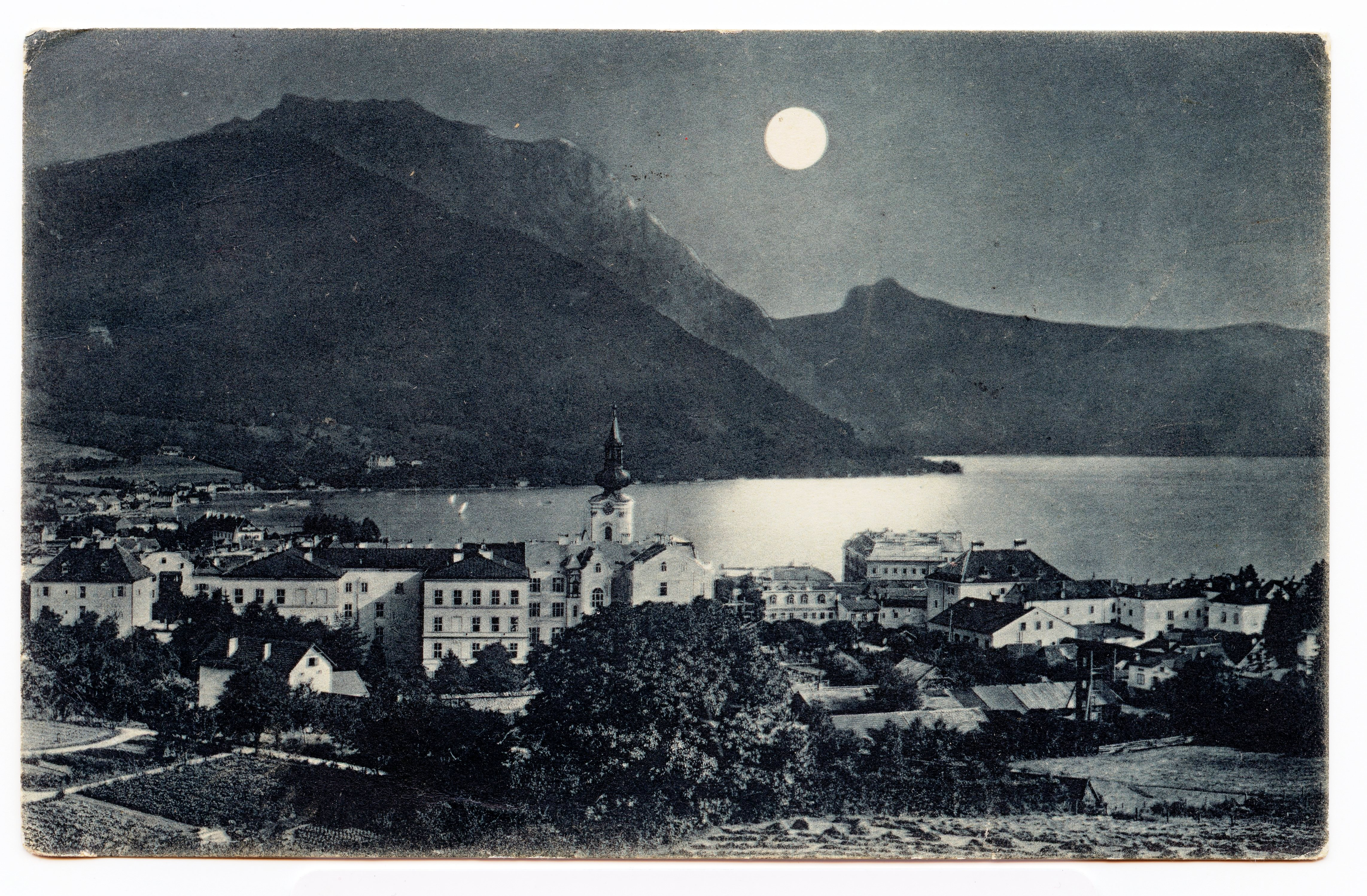 Pocztówka z 1911 z obiegu (wysłana z Gmunden 1 VIII 1912 r.) r. z widokiem Gmunden i jeziora Traunsee w świetle księżyca: "Gmunden und Traunsee (425 m) vom Calvarienberg". Wydawca: "1911 Stengel & Co., G. m. b. H., Dresden 2573". Pocztówka znajduje się w zbiorze prywatnym Roberta Pieńkowskiego z Wrocławia